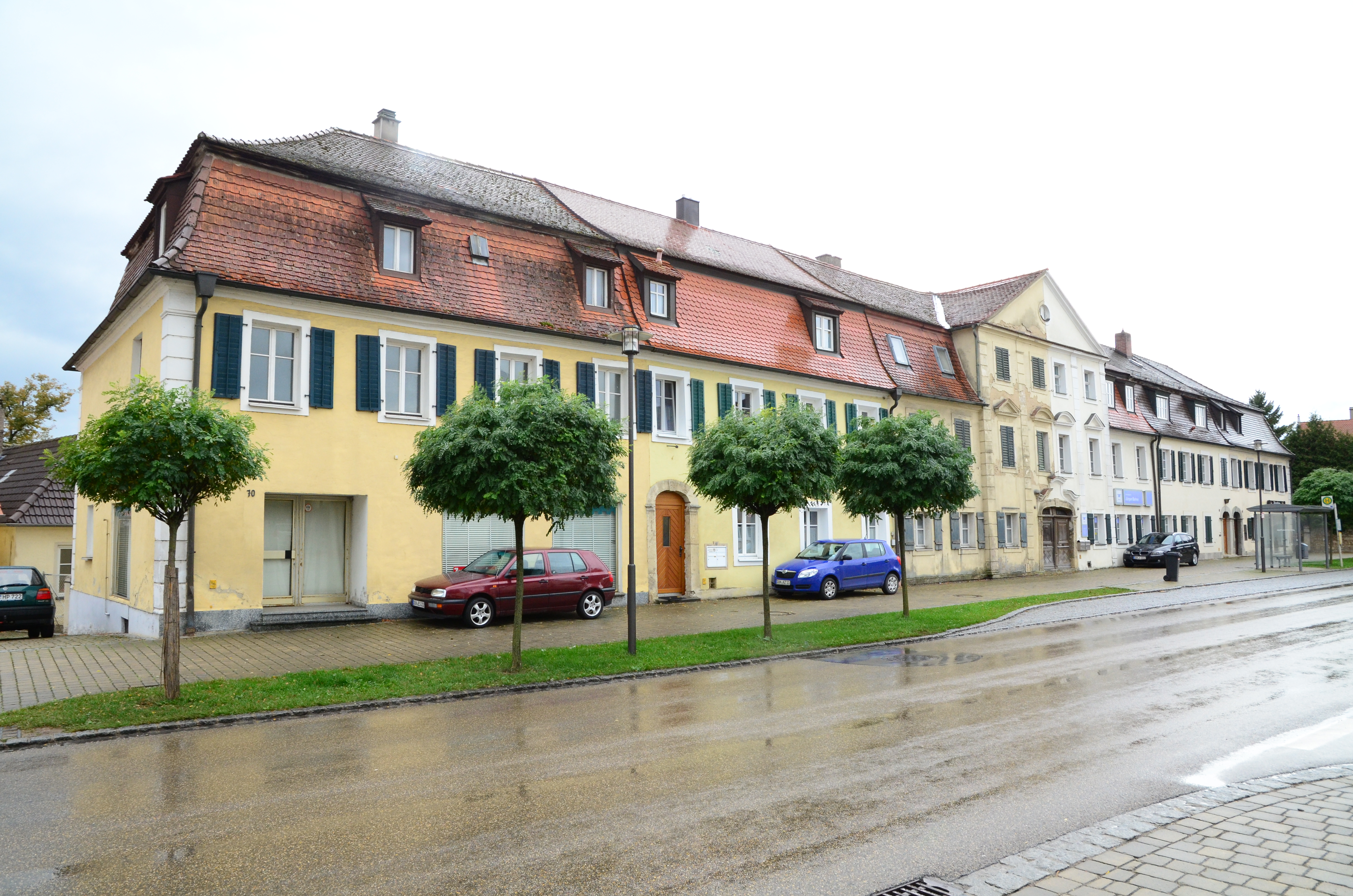 Wallerstein, Hauptstraße 60, 62, 64, 66, 68, 70